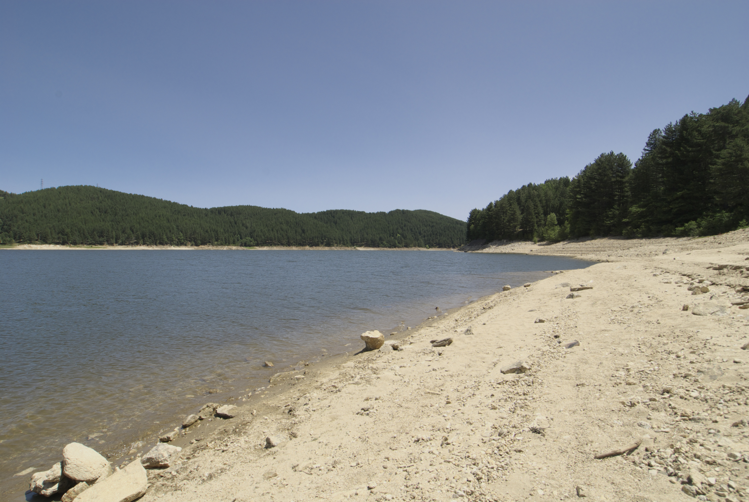 Lago Ampollino, Calabria, Italy